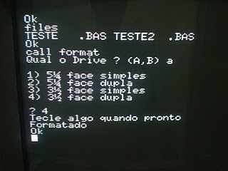 ブラジルのMSXであるグラジエンテ社のエキスパート(MSX1.1)のBASICでCALL_FORMATをした時の写真です。3.5インチのFDだけでなく5インチのFDもサポートしています。